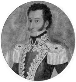 Manuel Matheu y Herrera, patriota de la Primer Junta de Gobierno de Quito, de 1809.